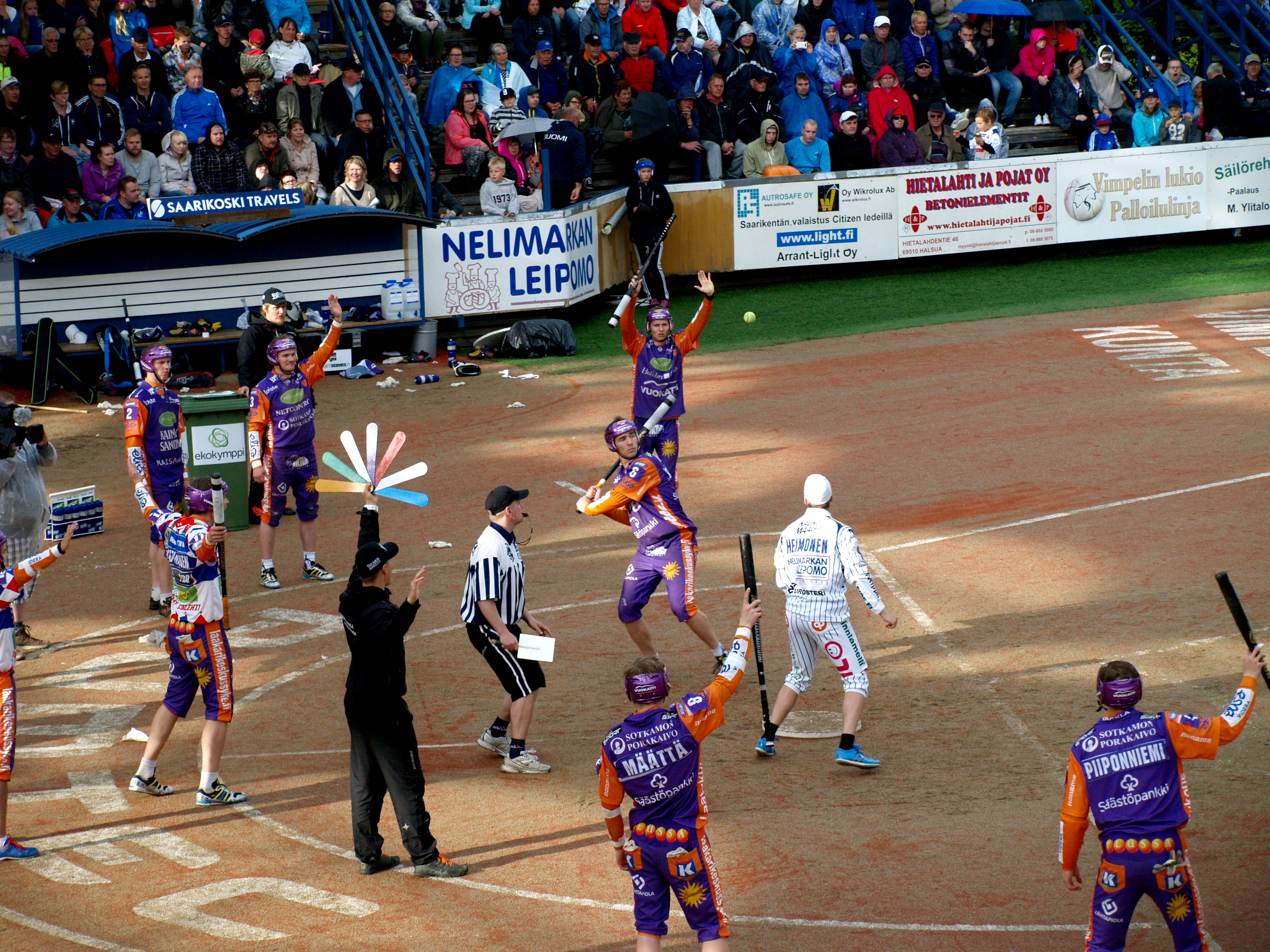 Vimpelin Veto - Sotkamon Jymy pesäpallo-ottelu 19.7.2015. Kuvassa lyömässä Immo Rautiainen.